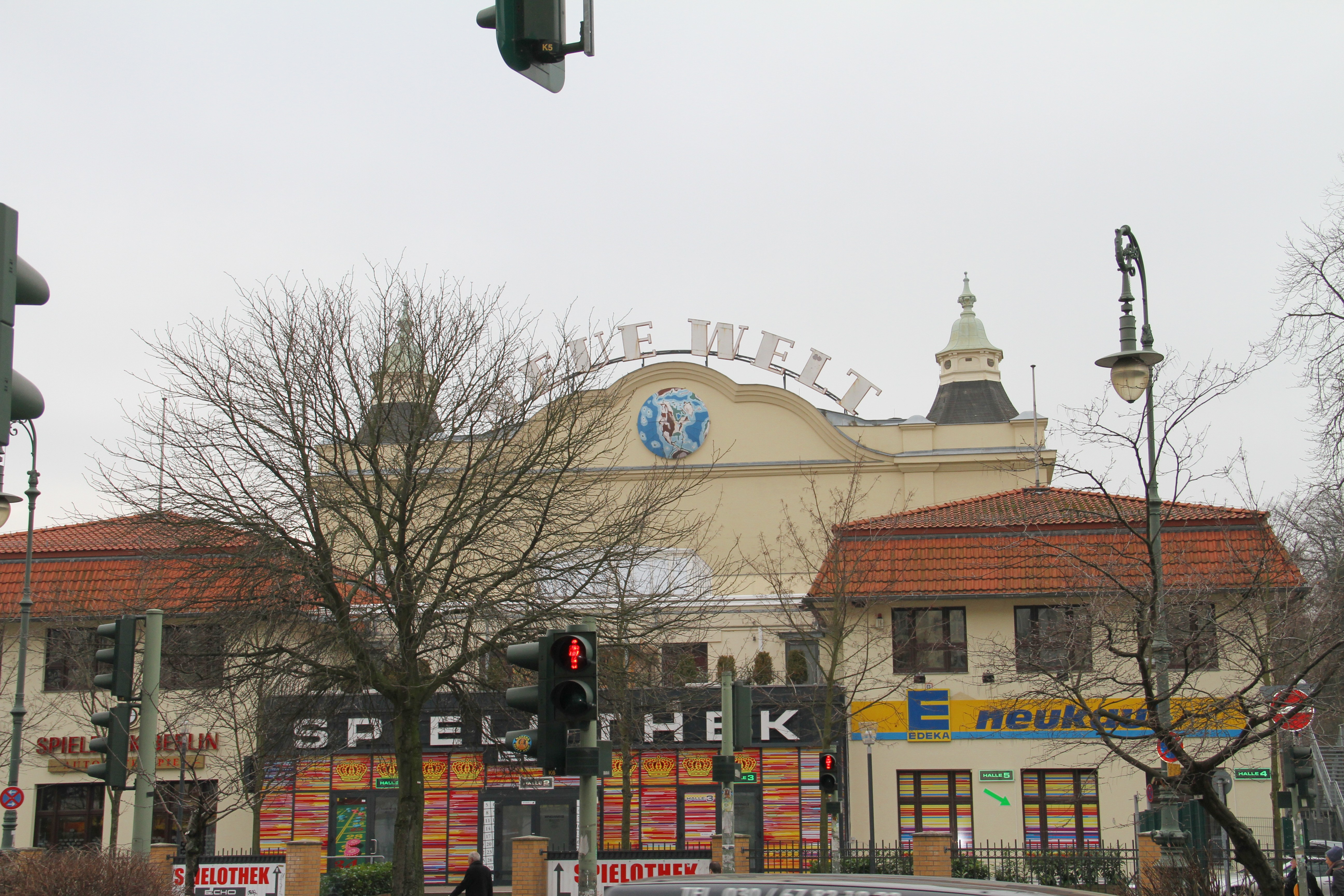 Neue Welt 1902–1903 von A. Sonnenburg, Umbau 1910 von A. Sonnenburg